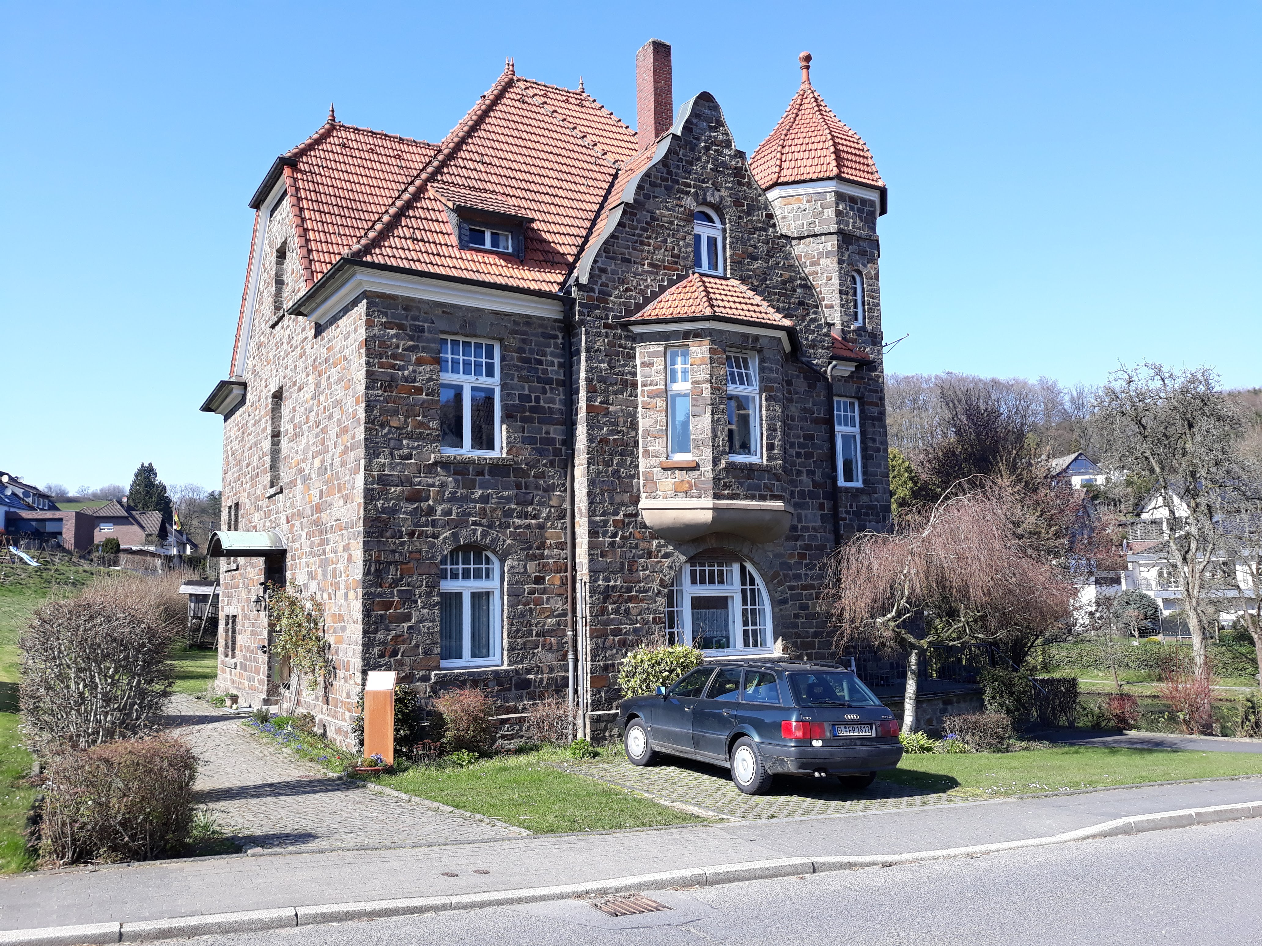 Olpe ehemaliges Rathaus